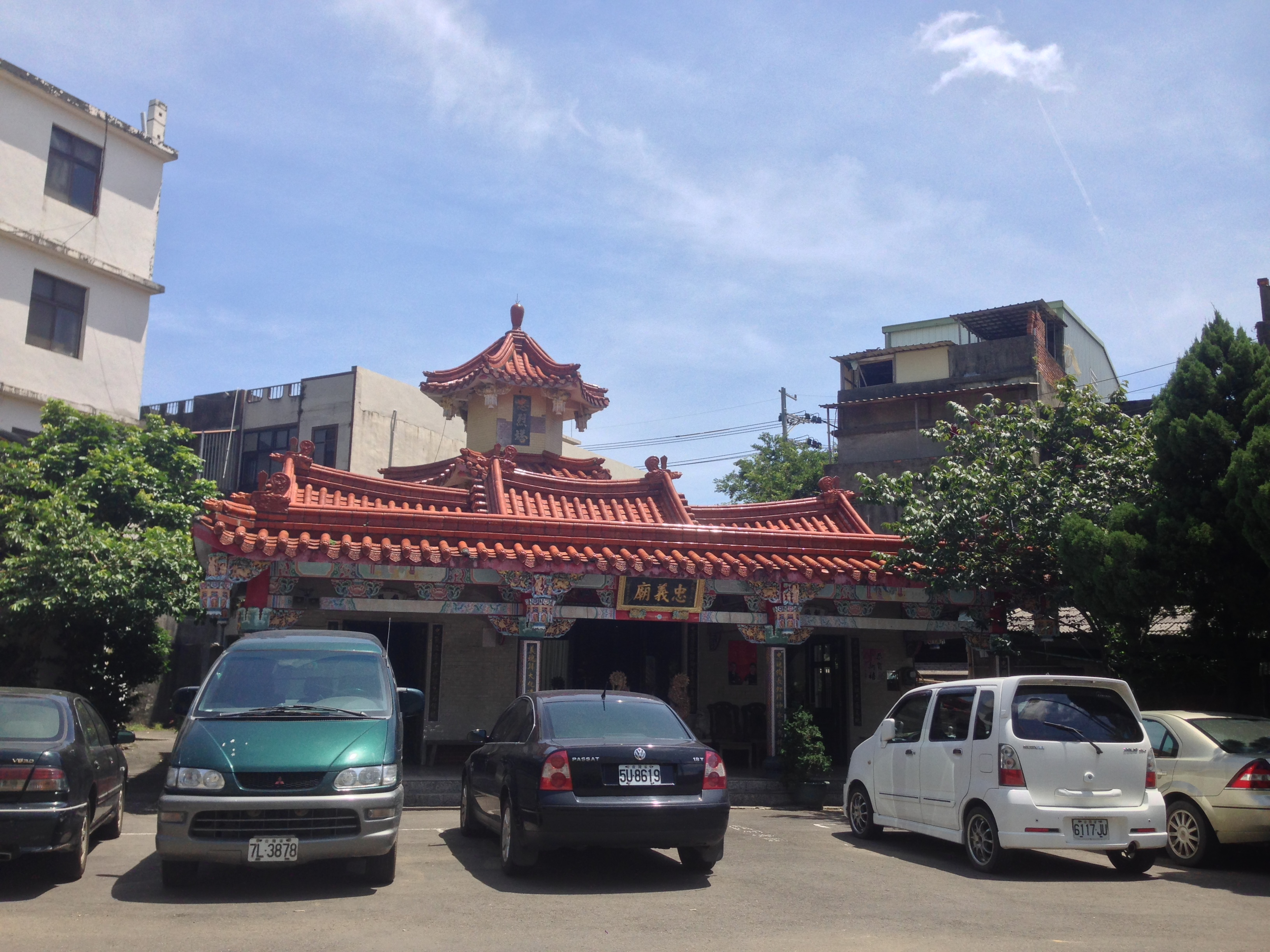 七十三公廟